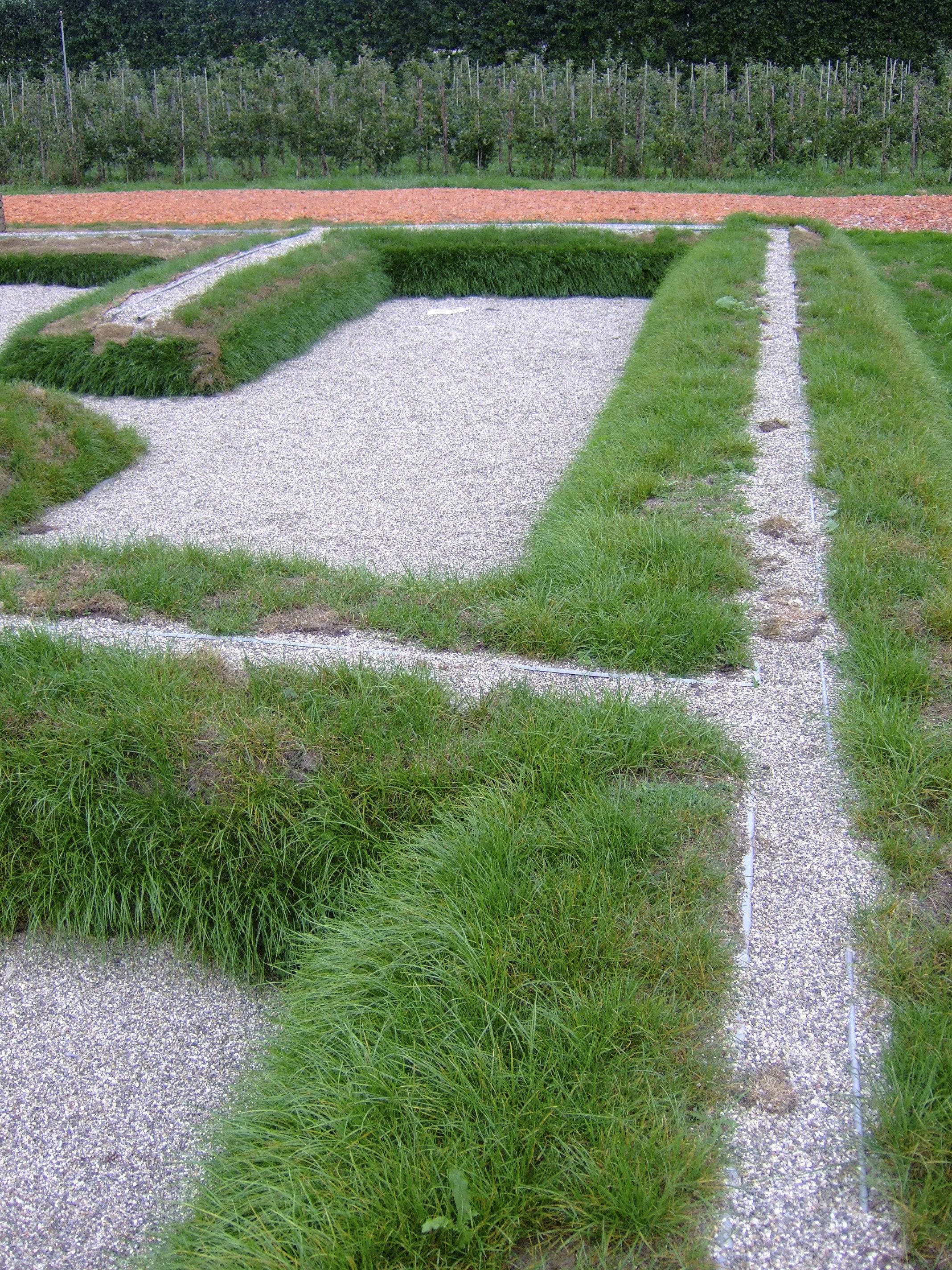 Archeologie/ Utrechts-Gelders rivierengebied: Reconstructie van Romeins badhuis, gelegen in het castellum Archeoregio 13 (opmerking: Publicatie Uit Balans 2006)